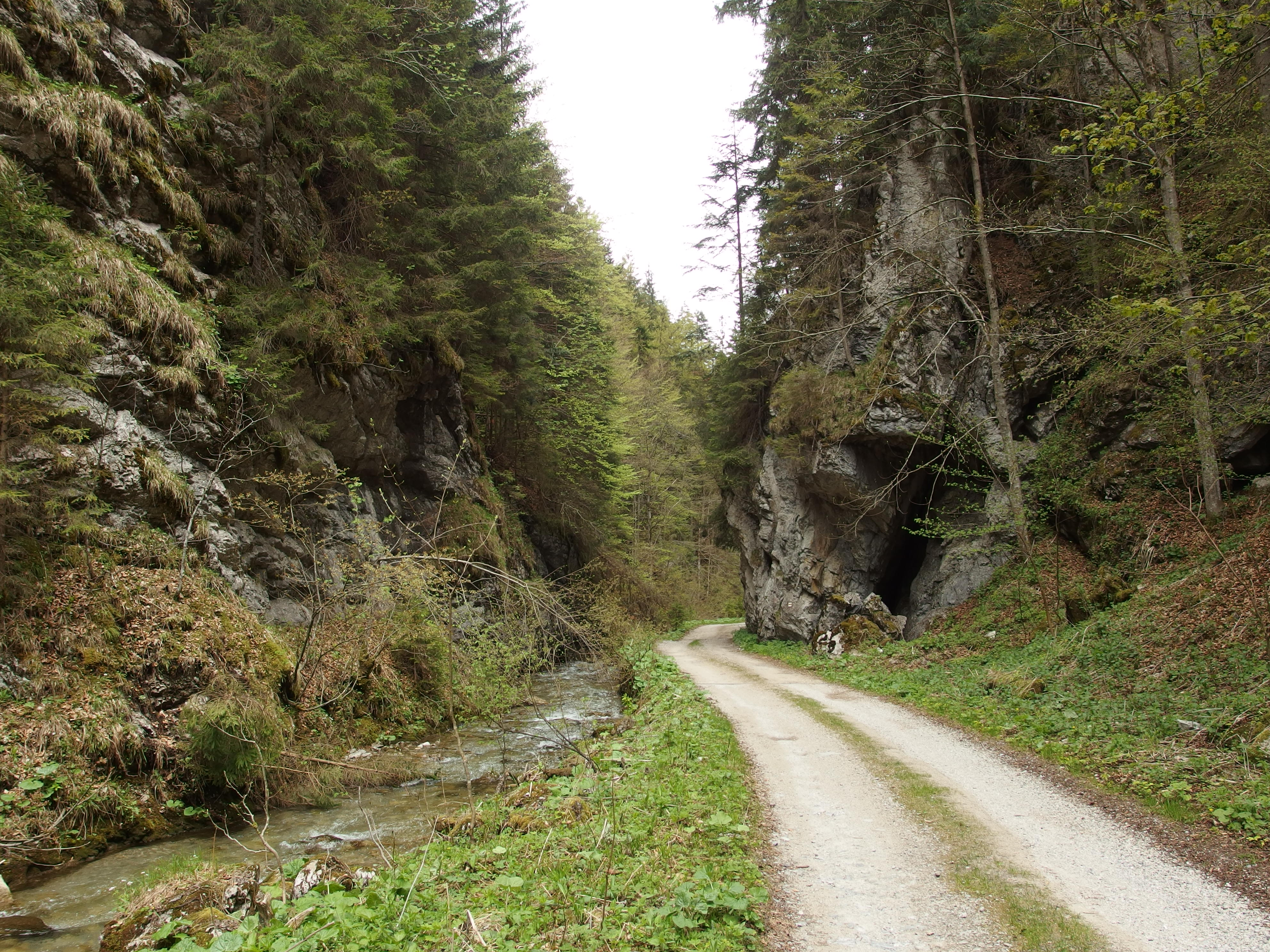 Tiesňavy v Dedošovej doline